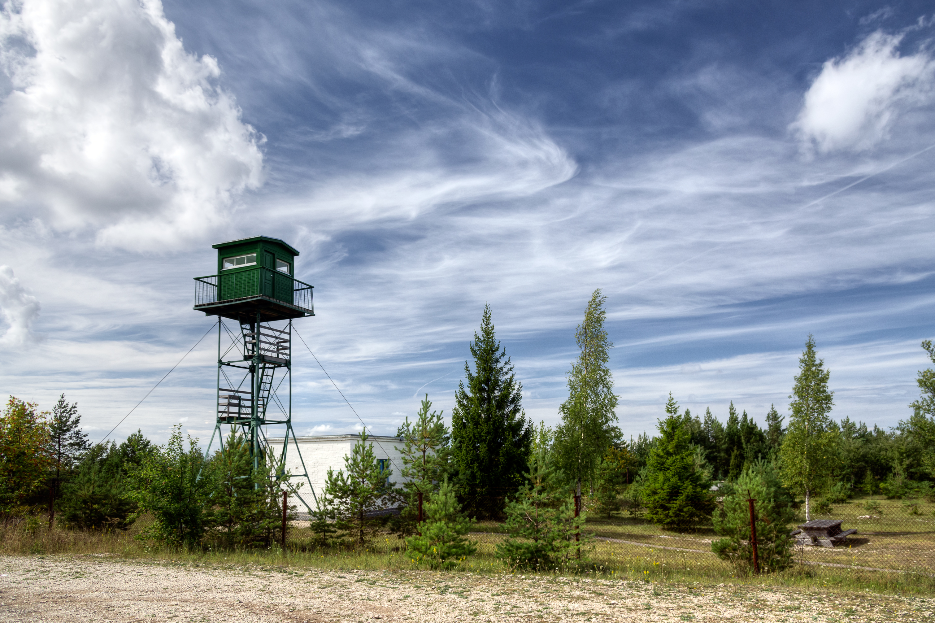 Vaatlustorn Ninase panga juures. Küdema lahe hoiuala